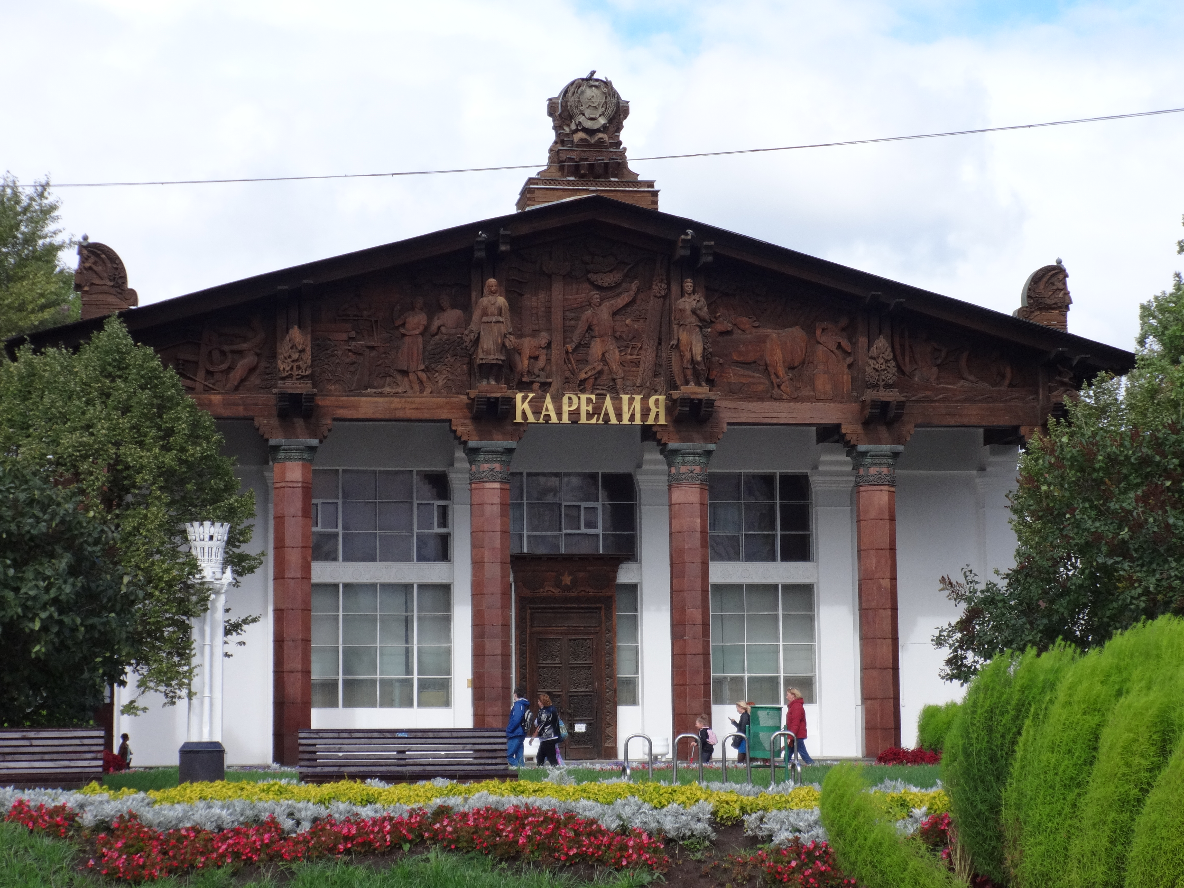 Павильон «Карелия» (бывший Карело-Финский ССР) (Москва и Московская область, Москва, Мира проспект, 115. Построено в 1954 году по проекту архитектора Ф.И.Рехмукова)